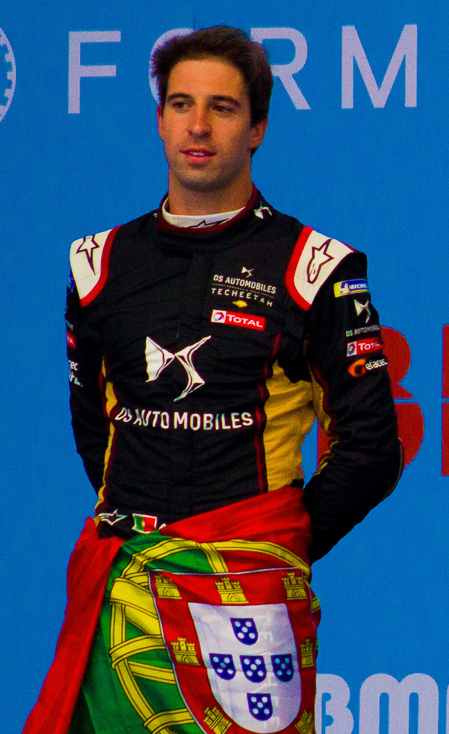 2019-20 FIA Formula E, CBMM Niobium Mexico City E-Prix 2020, Autódromo Hermanos Rodríguez, Ciudad de México, 15 de febrero 2020